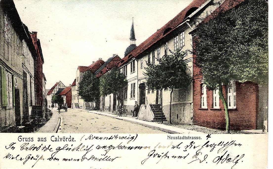 Calvörder Neustadt, szene in der neustadtstraße. Postkartenbild: gestempelt 1905.